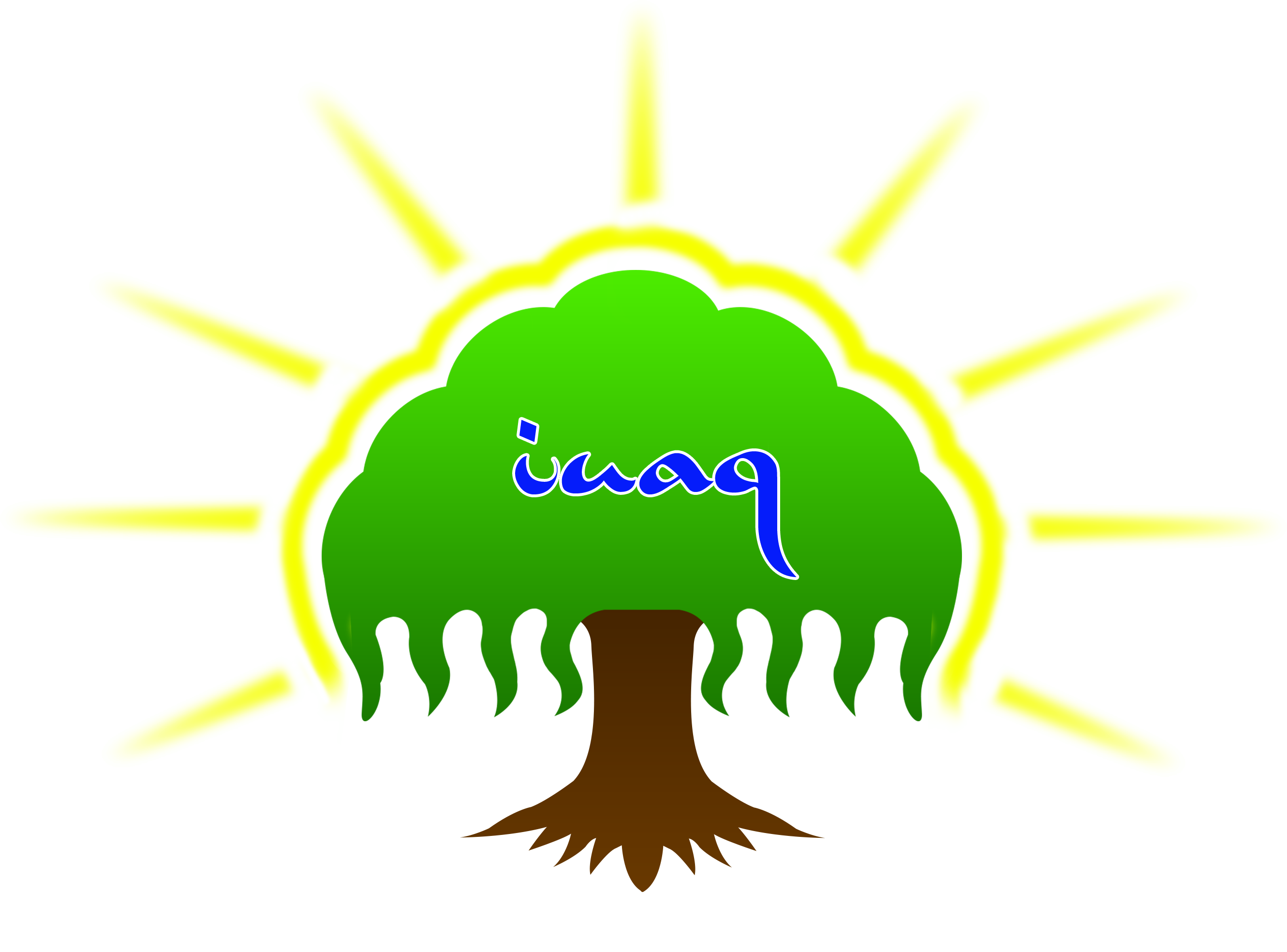 logo ilham uwais al qarni